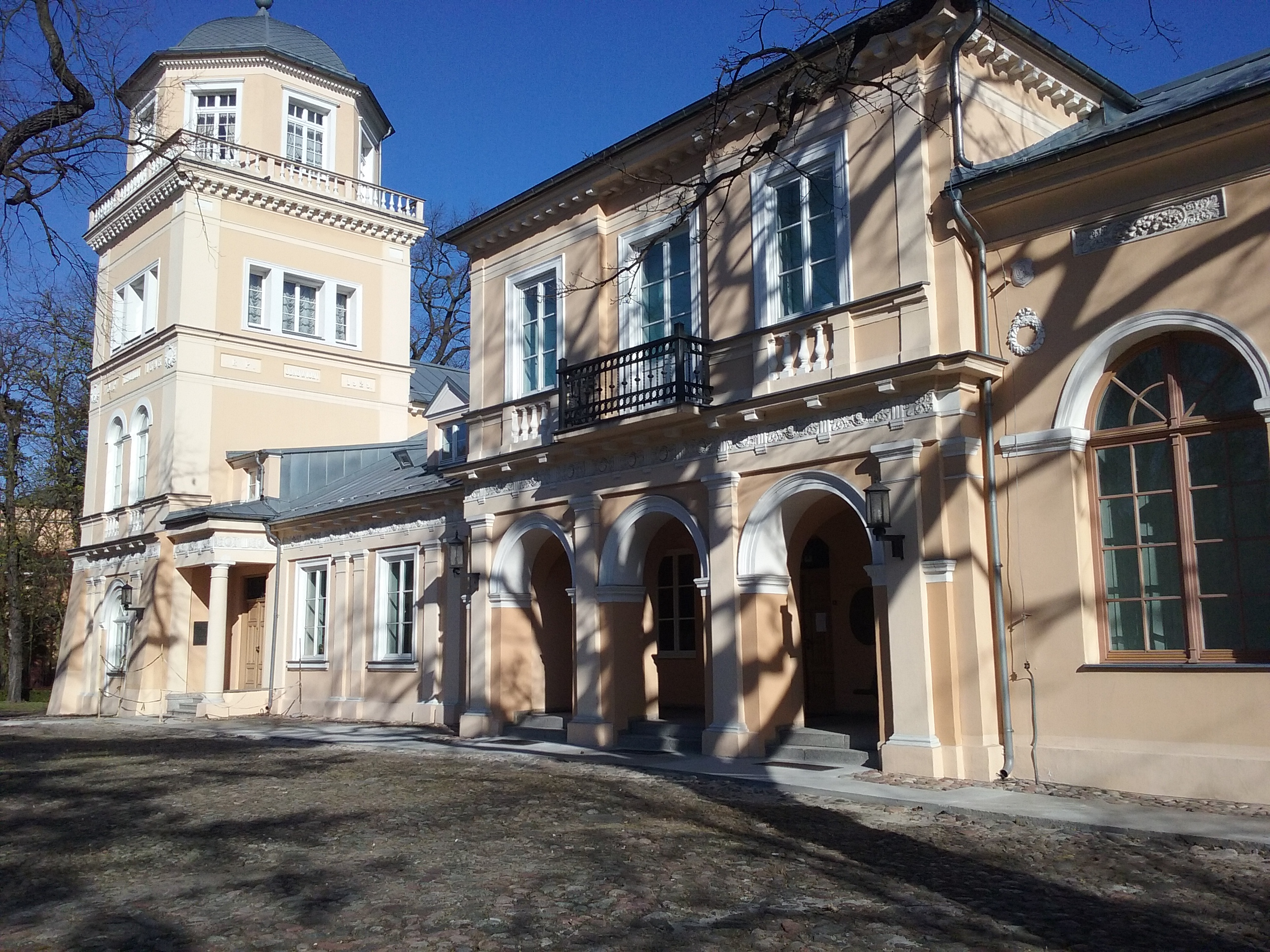 Ostrowskis' Family summer palace in Tomaszów Mazowiecki, P.O.W. Street